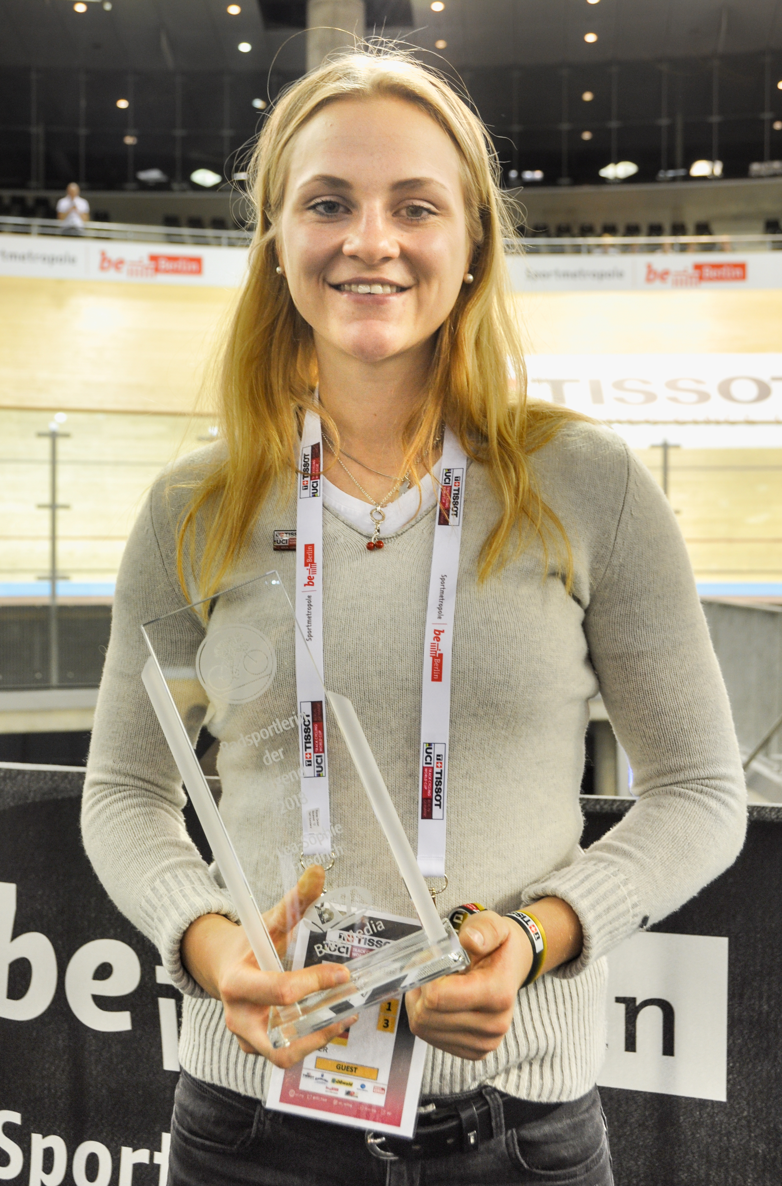 Lea Sophie Friedrich, deutsche Radsportlerin, Nachwuchs-Radsportlerin des Jahres 2018